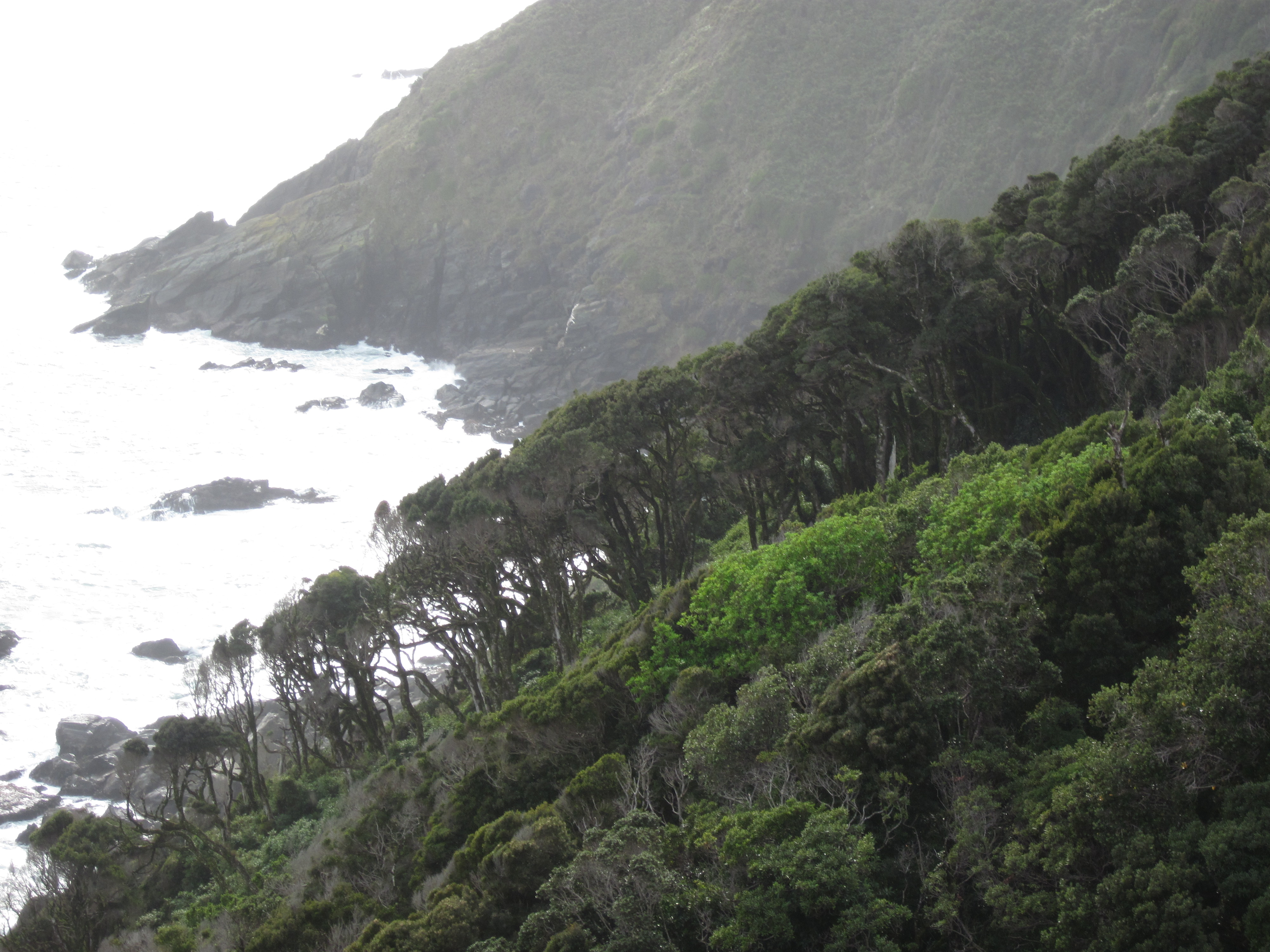 Bosque puro de Aextoxicon punctatum (olivillo) en el Área Costera Protegida Punta Curiñanco. Foto de Mayo-Junio desde el mirador de olvillos.